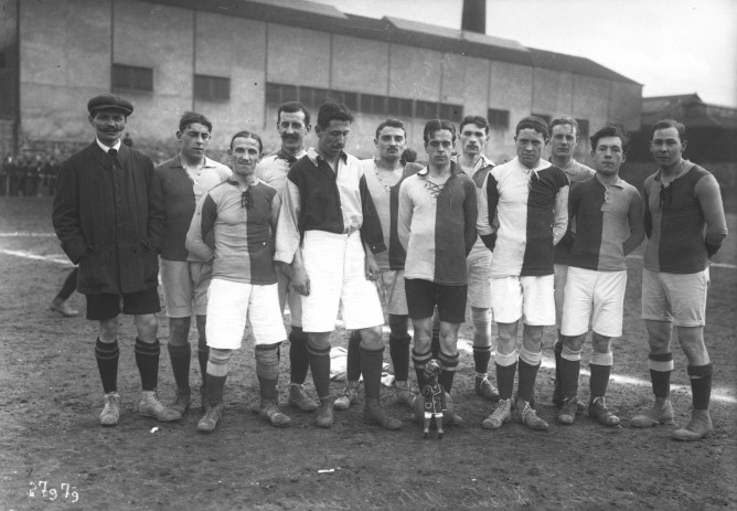 Photo de l'équipe de football du Havre AC lors du tournoi de Pâques 1913.